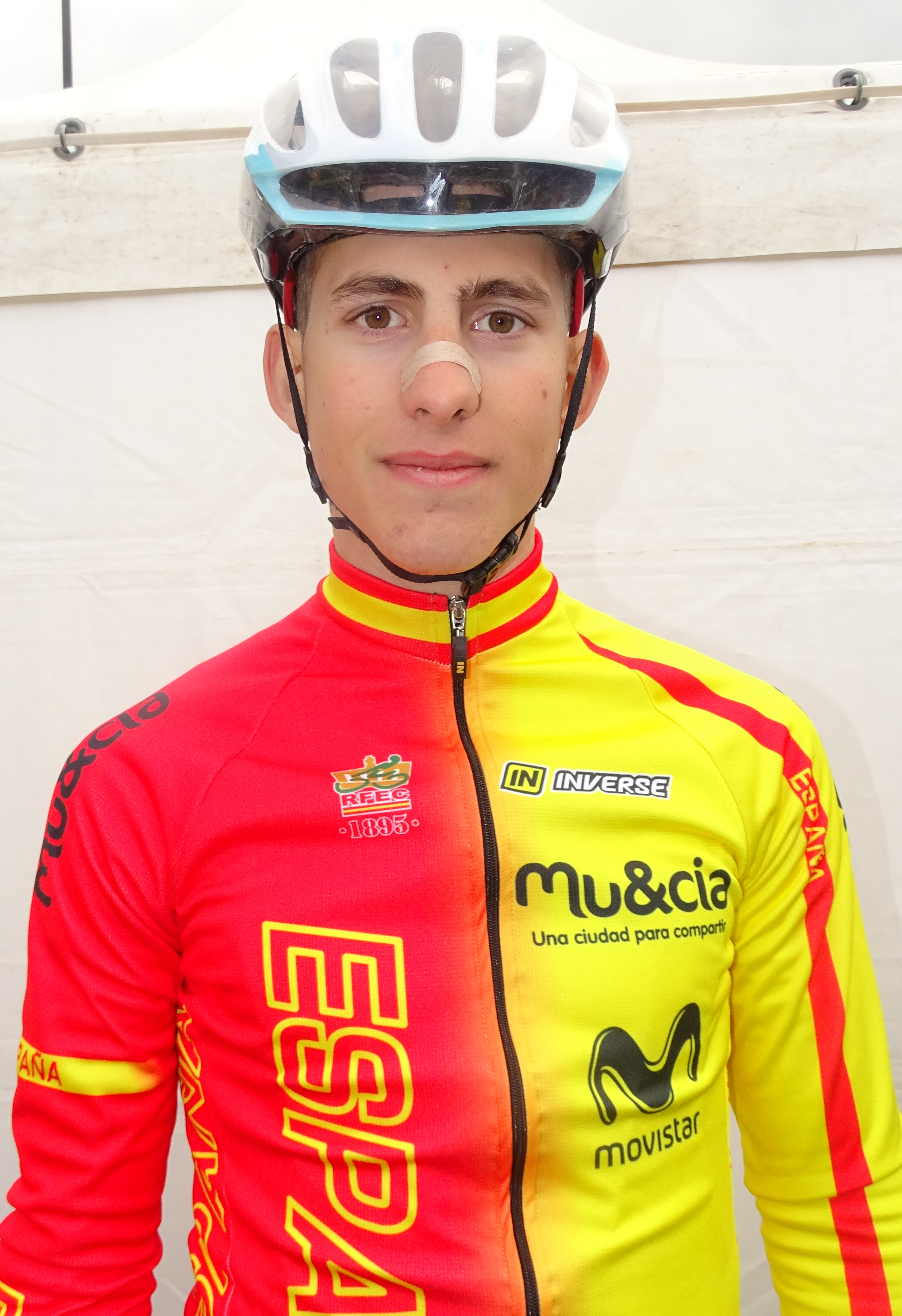 Reportage réalisé le samedi 11 avril à l'occasion du départ et de l'arrivée du Tour des Flandres espoirs 2015 à Audenarde, Belgique.